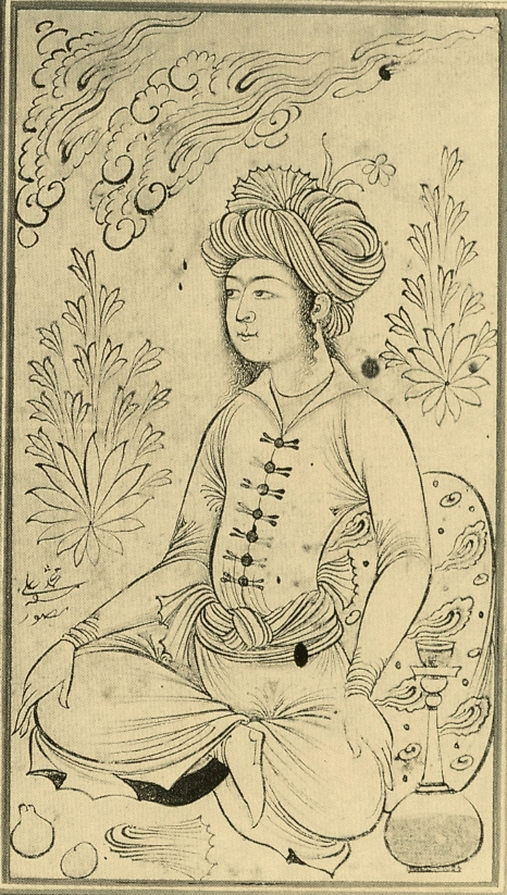 Юноша на фоне пейзажа. 1650-60 Брит муз. подписан